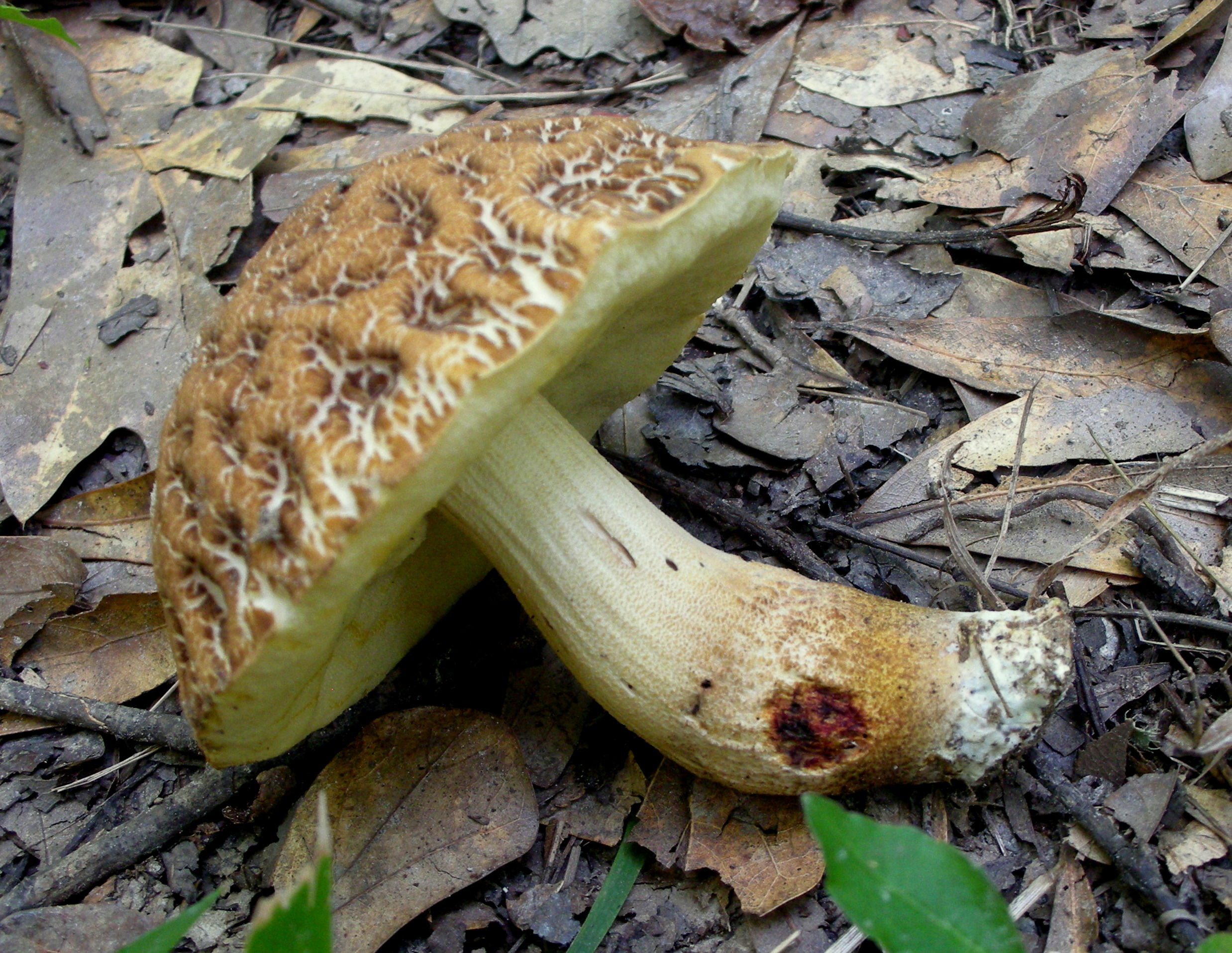 Leccinellum crocipodium (Letell.) Bresinsky & Manfr. Binder